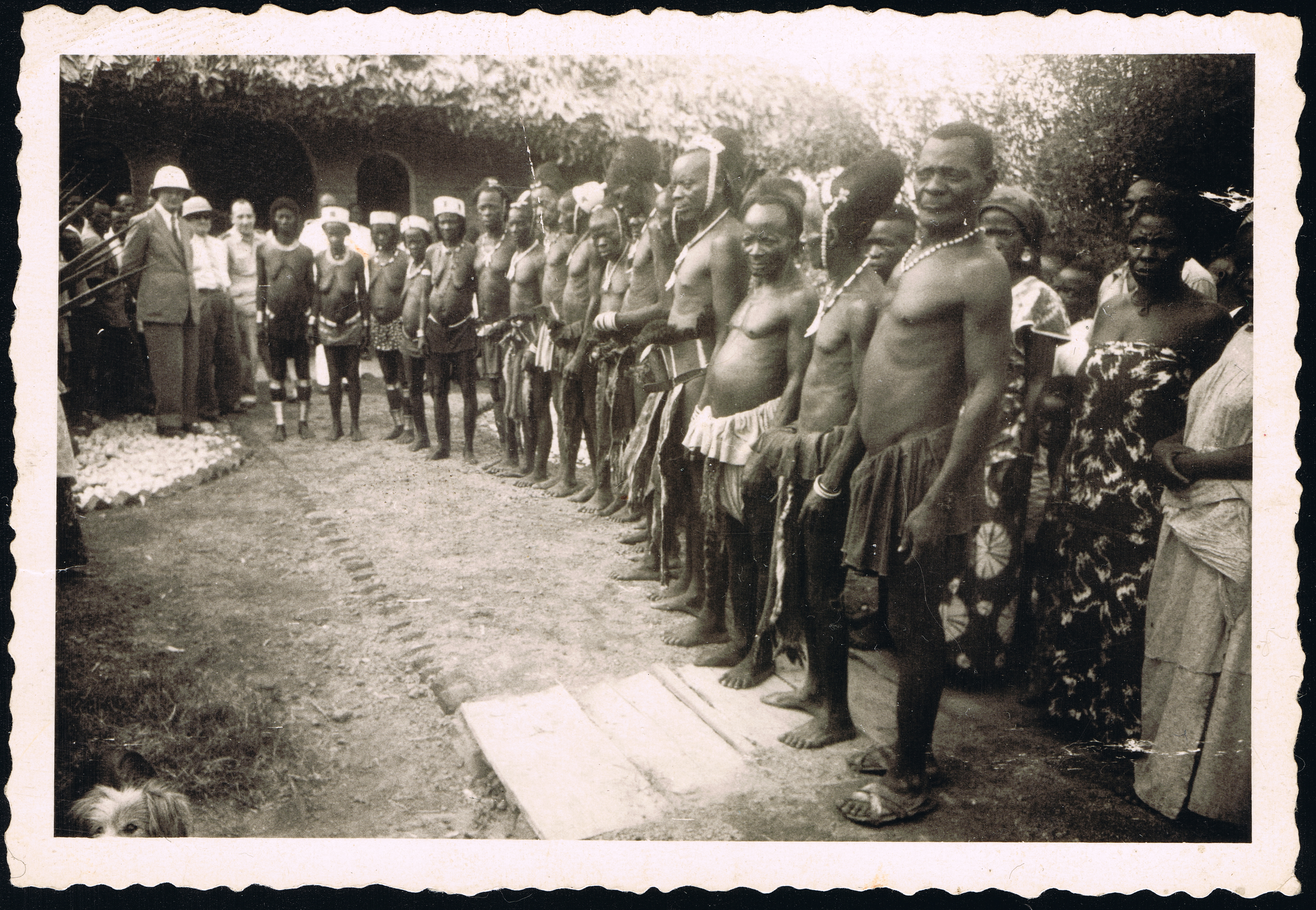 Visite du ministre Wigny à Kalima, ex-Congo Belge. Actuel RDC. Date exacte inconnue.